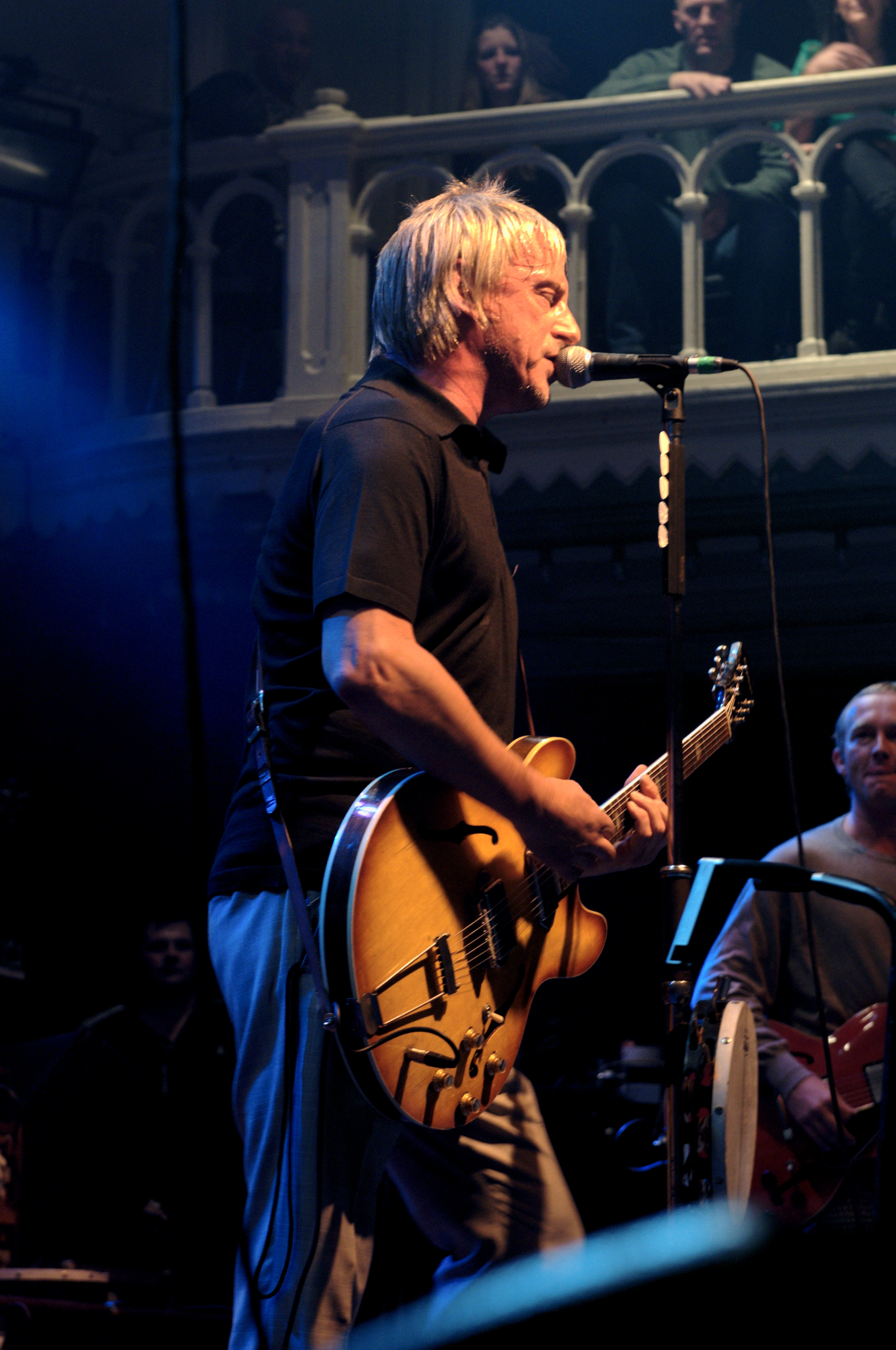 Concert de Paul Weller le 4/09/08 au Paradiso à Amsterdam